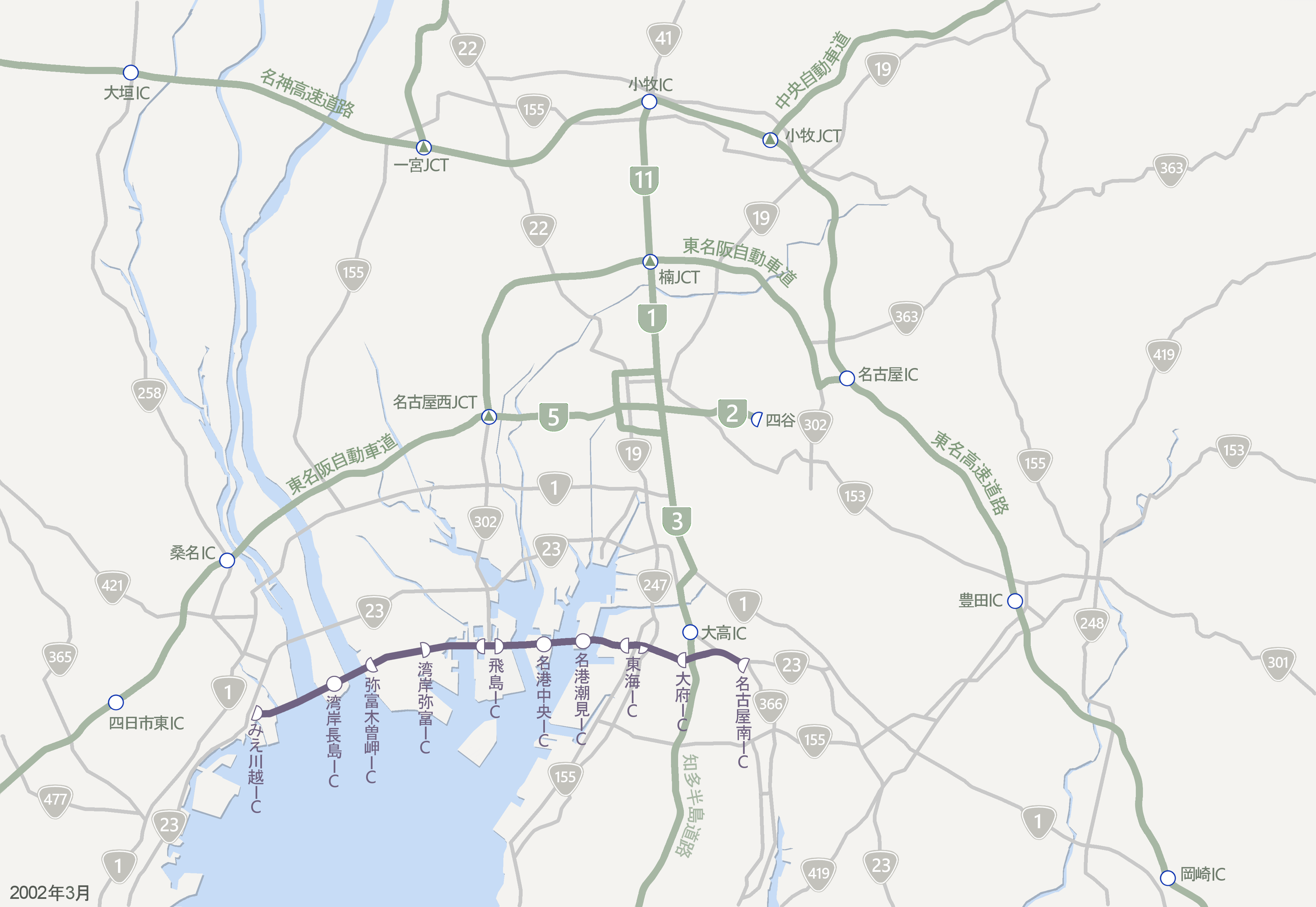 伊勢湾岸自動車道2002年3月時点